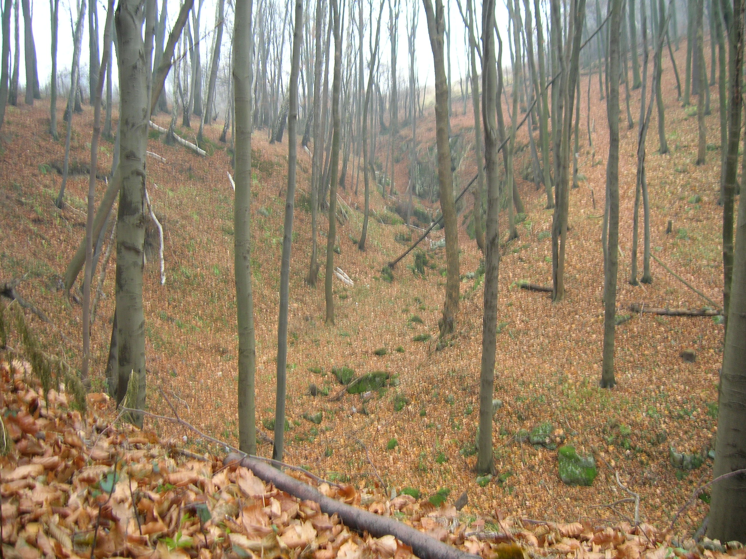 Kulenda.Zachód